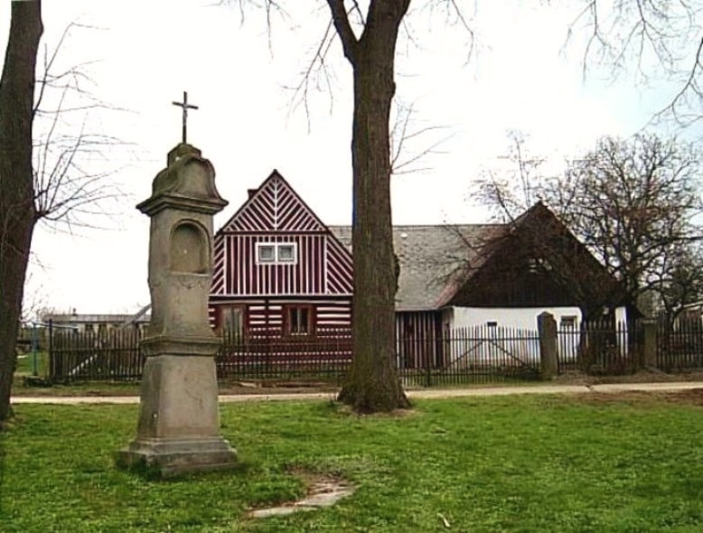 střed obce